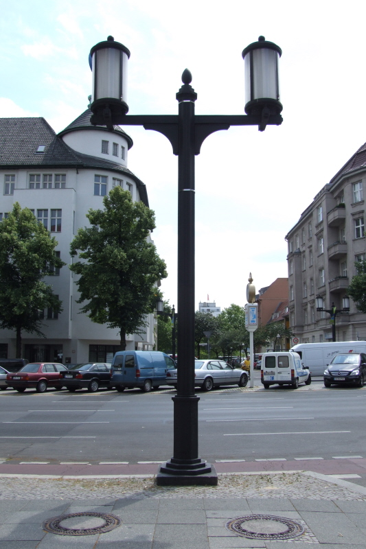 Berlin Leuchten der Ost-West-Achse Fotograf: Harald Rossa Datum: Juni 2006 Höher aufgelöste Version ist verfügbar